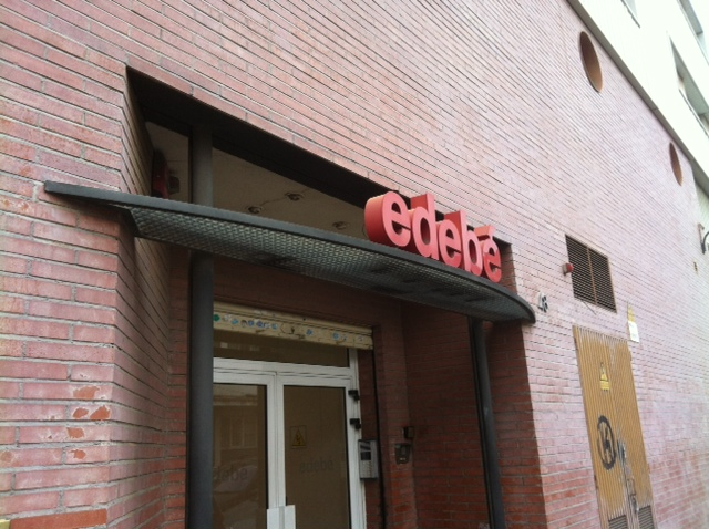 Grup Edebé magatzem L'Hospitalet